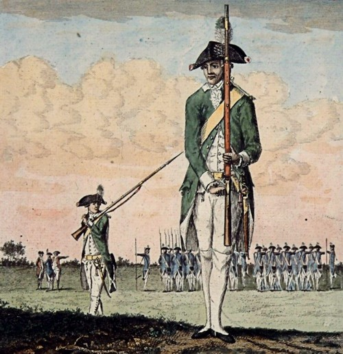 Exercitiegenootschap 'De Vrijheid' 1783 te Dordrecht - Stadsarchief Dordrecht